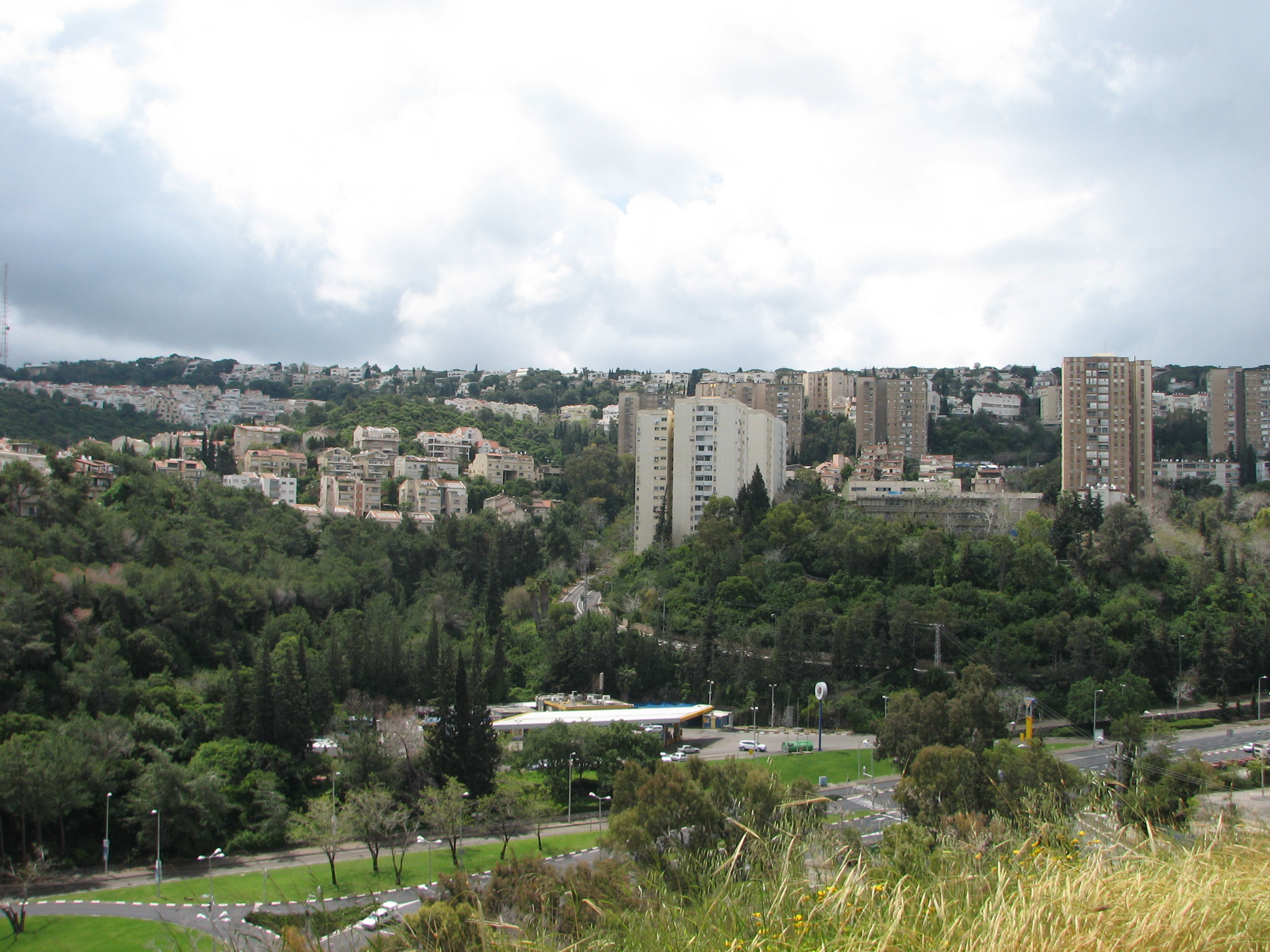 Ramot Ben Gurion, Neighborhood, Haifa Israel רוממה החדשה, שמה הרשמי הוא רמות בן גוריון, נבנתה על גבעה גבוהה יותר בסוף שנות ה-60, ממזרח לשכונת רוממה הישנה ומצפון לשכונת אחוזה תצפית משכונת רוממה הישנה